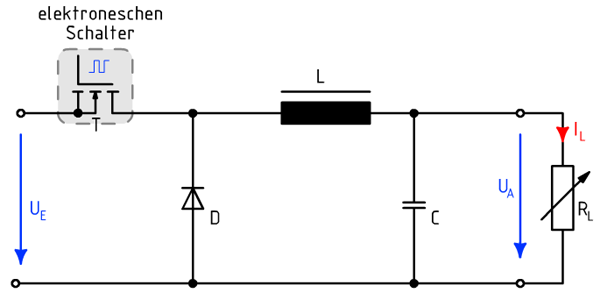 Prinzipschaltung vun engem Duerchflosswandler